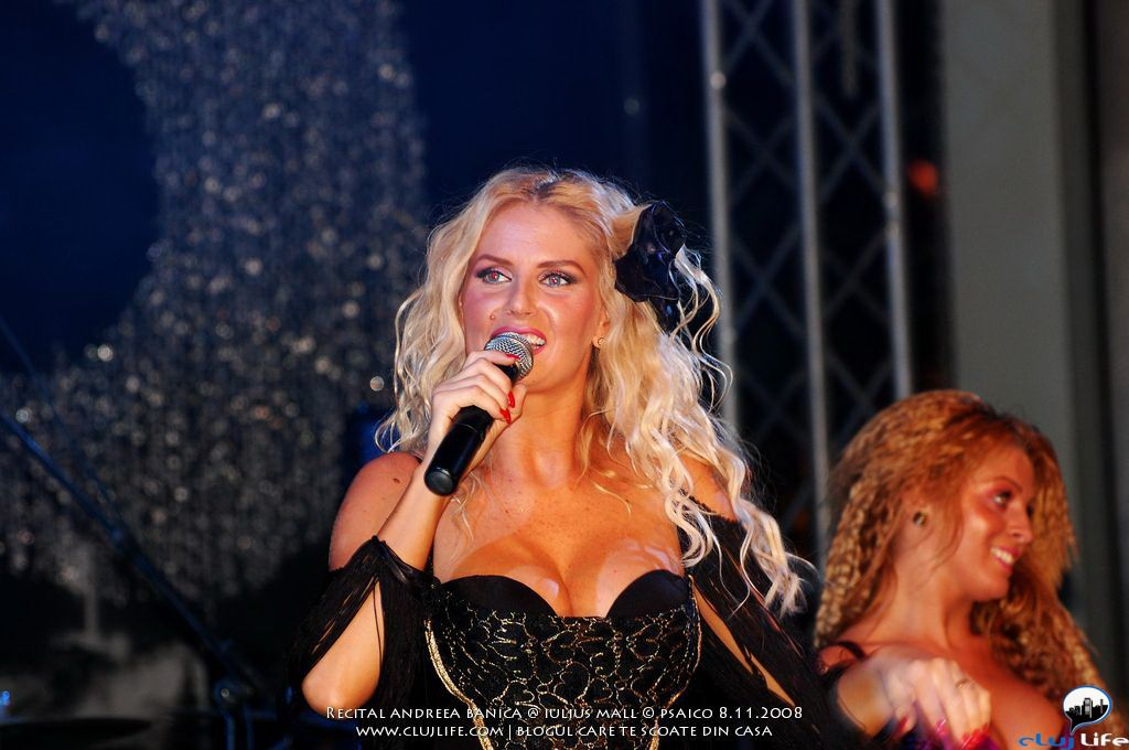 La cantante rumana Andreea Banica en un concierto en Cluj, 2008.